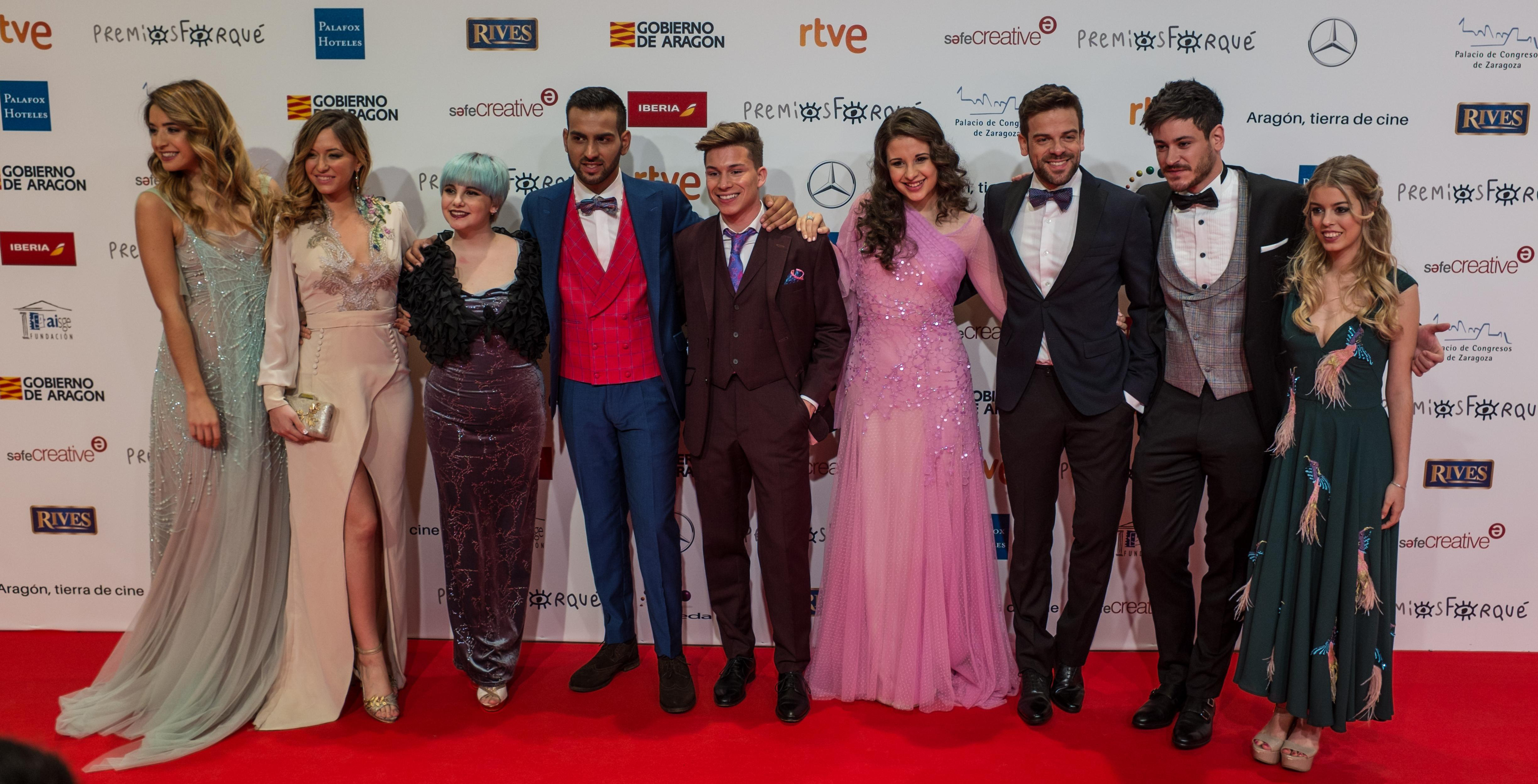 Participantes de Operación Triunfo España (2017) en la entrega de los premios Forqué.